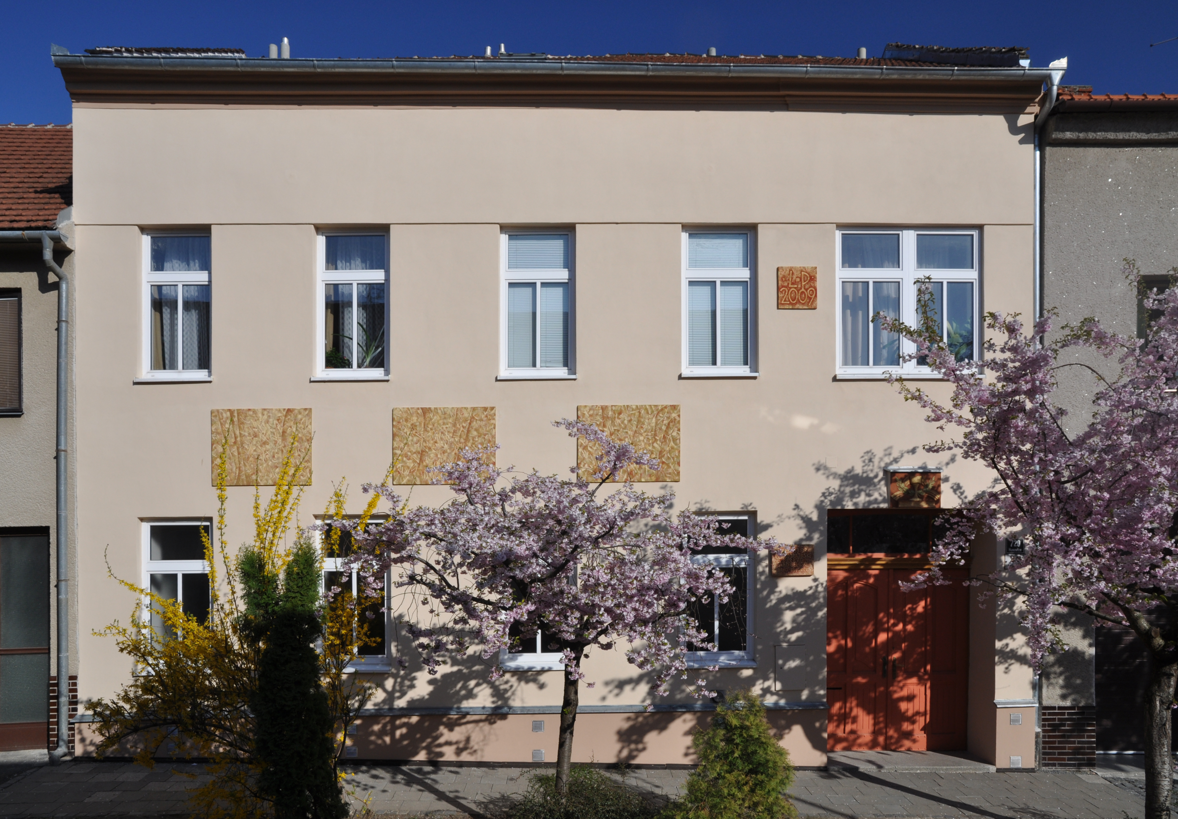 Farní úřad Českobratrské církve evangelické v Brně - Husovicích.